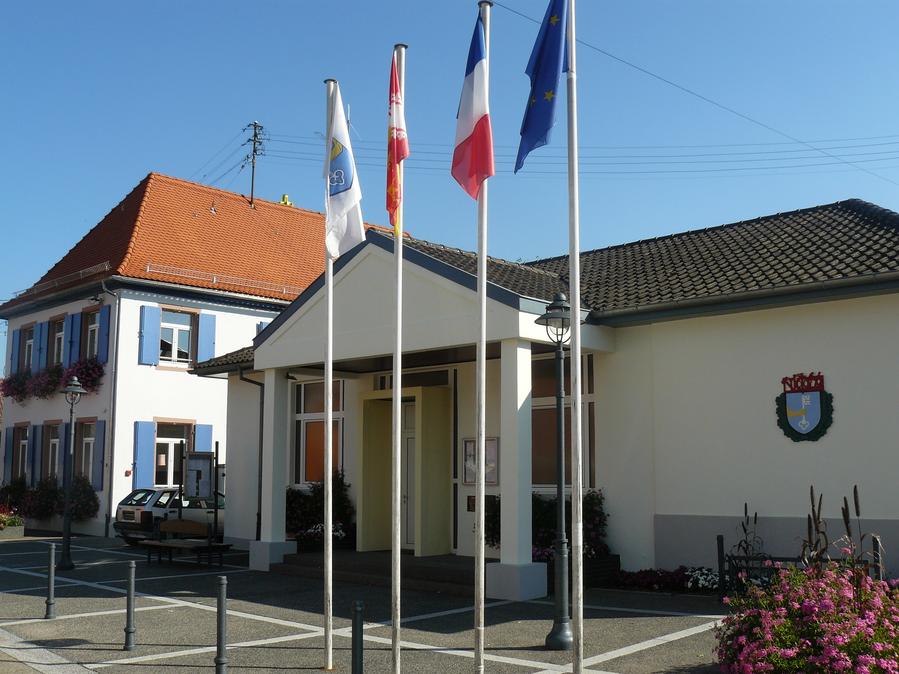 Mairie